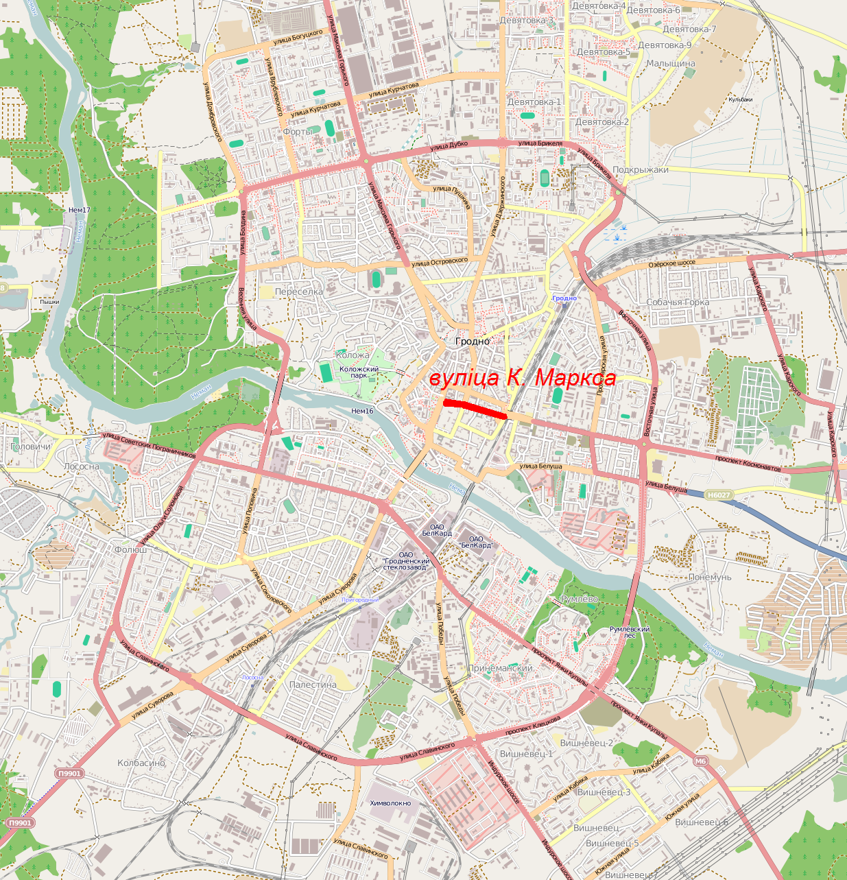 Беларуская (тарашкевіца): Вуліца Маркса на мапе Гродна